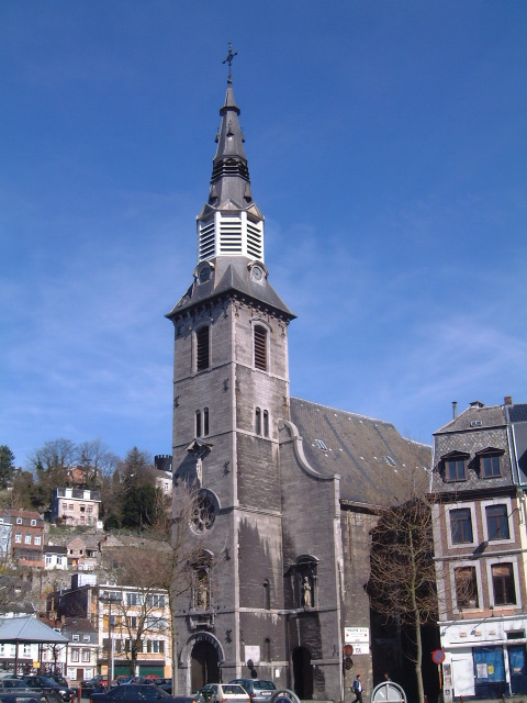 Notre Dame des Récollets erbaut 1650, in Verviers Belgien